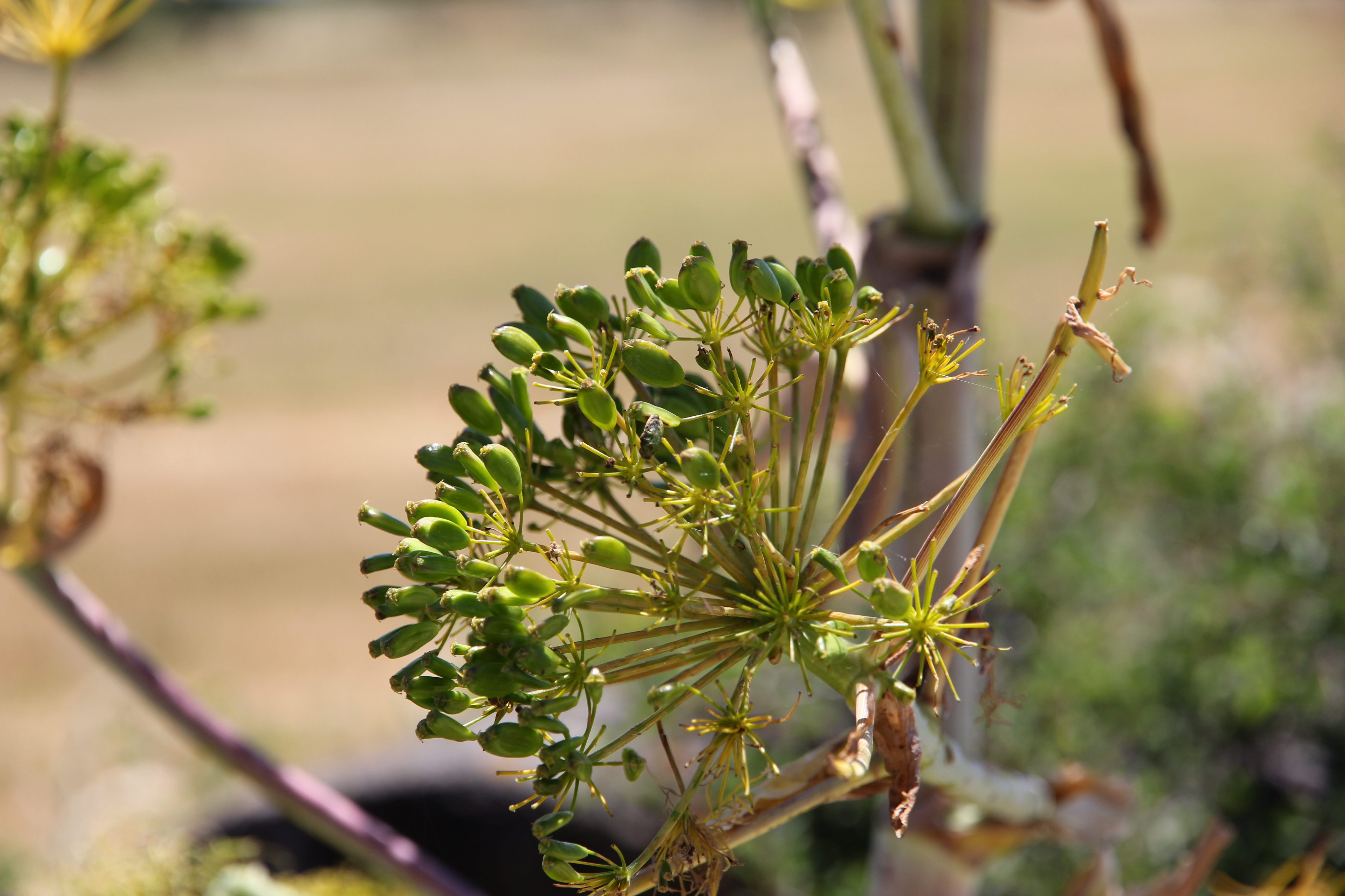 Flora della Sardegna